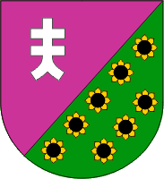 Wappen Apostolowe Stadt